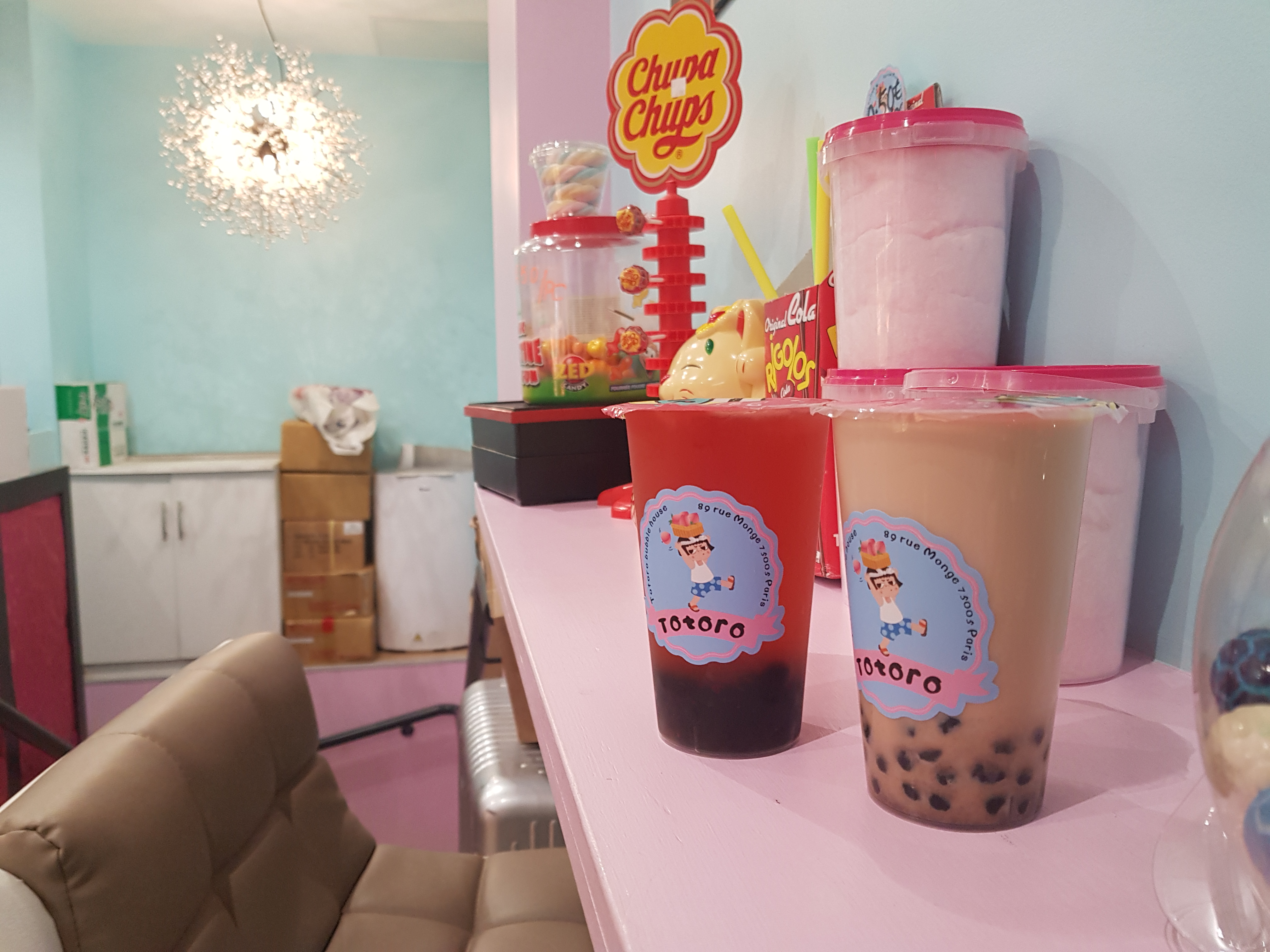 bubble teas en France